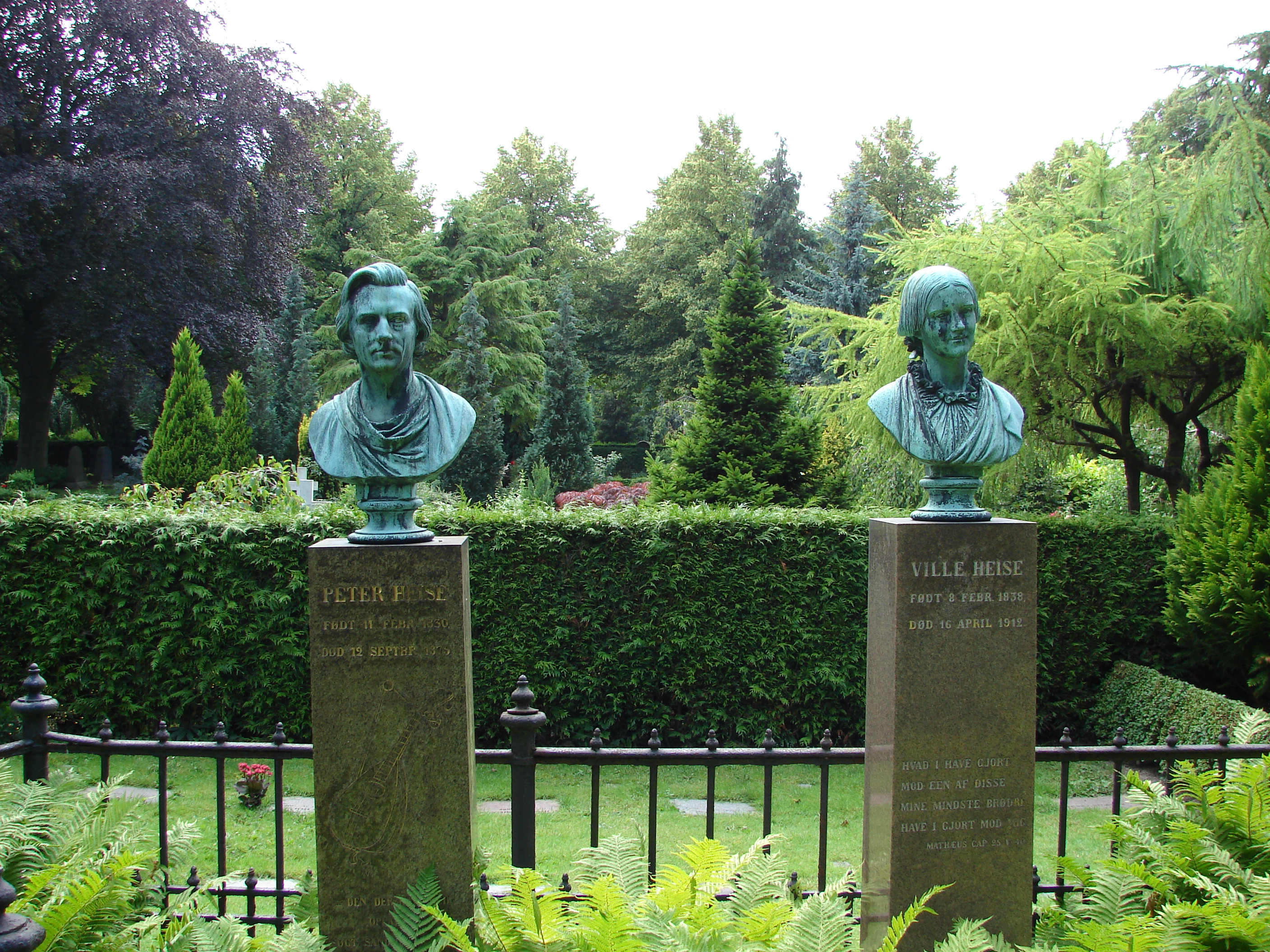 Komponist Peter Heise (1830-1879) og Ville Heise (1838-1912), gravminde, Holmens Kirkegård, København